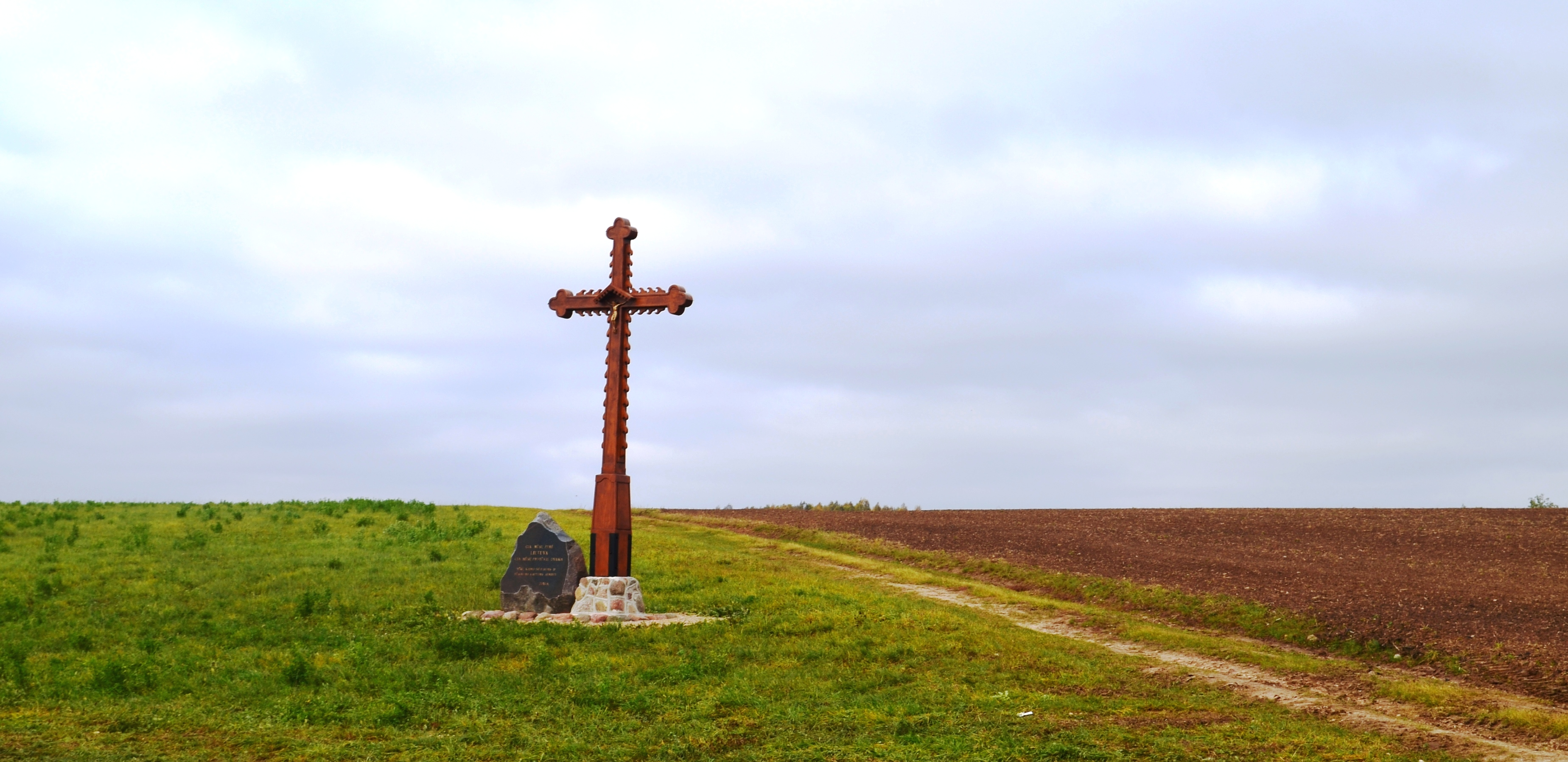 Rukų kaimo kryžius, Kėdainių raj.